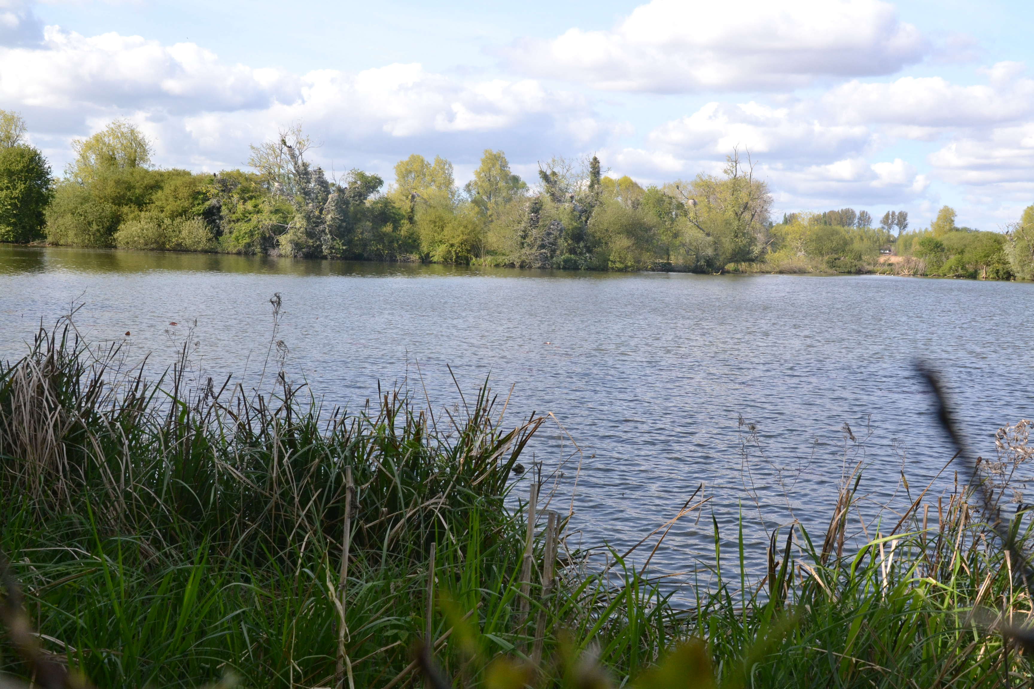 Réserve naturelle nationale des étangs du Romelaëre (Nieurlet, Nord et Clairmarais, Pas-de-Calais).